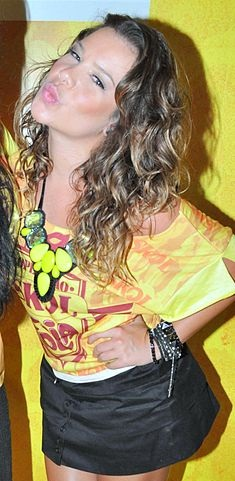 Fernanda Souza